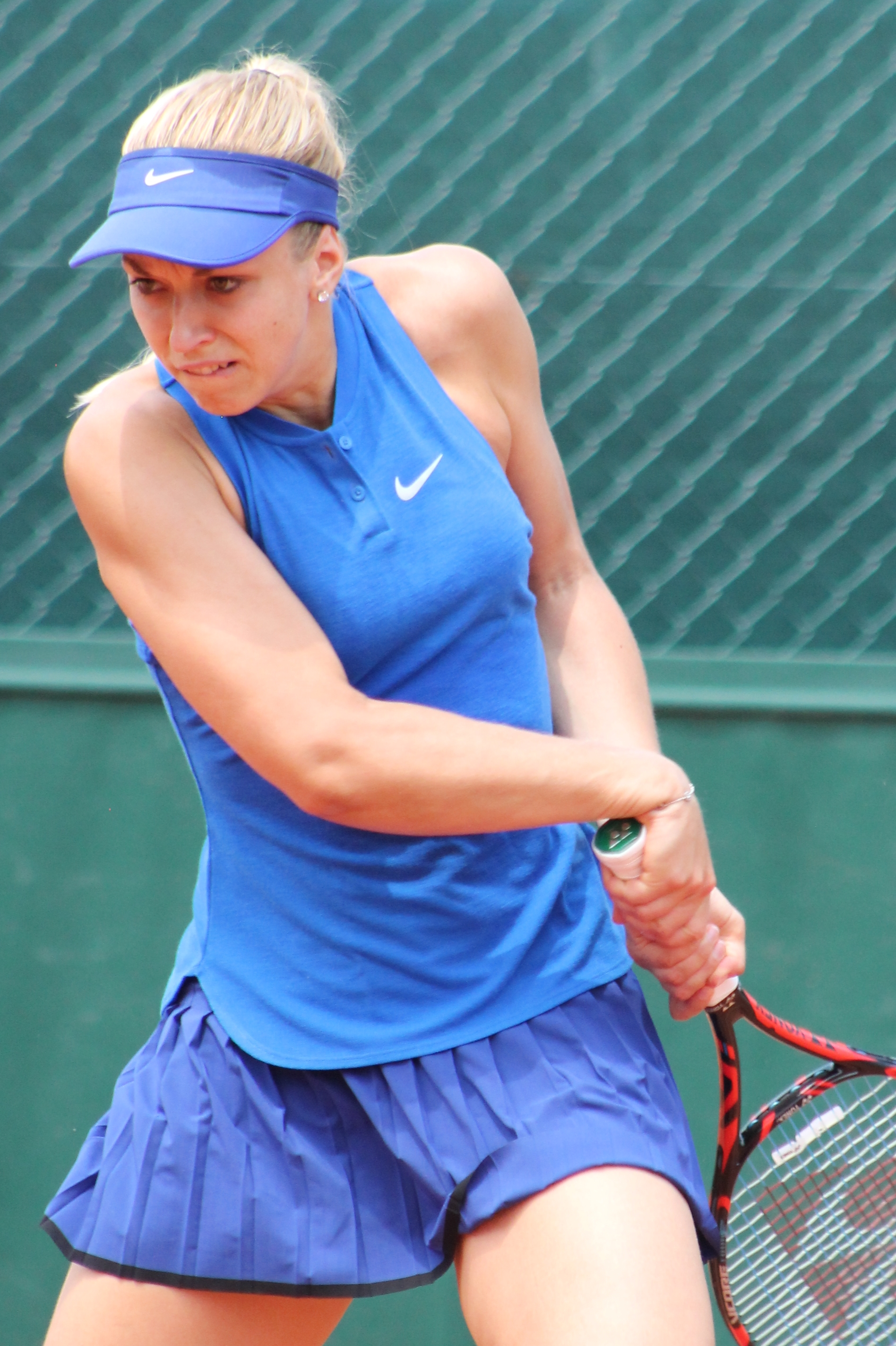 Lisicki RG16 (8)